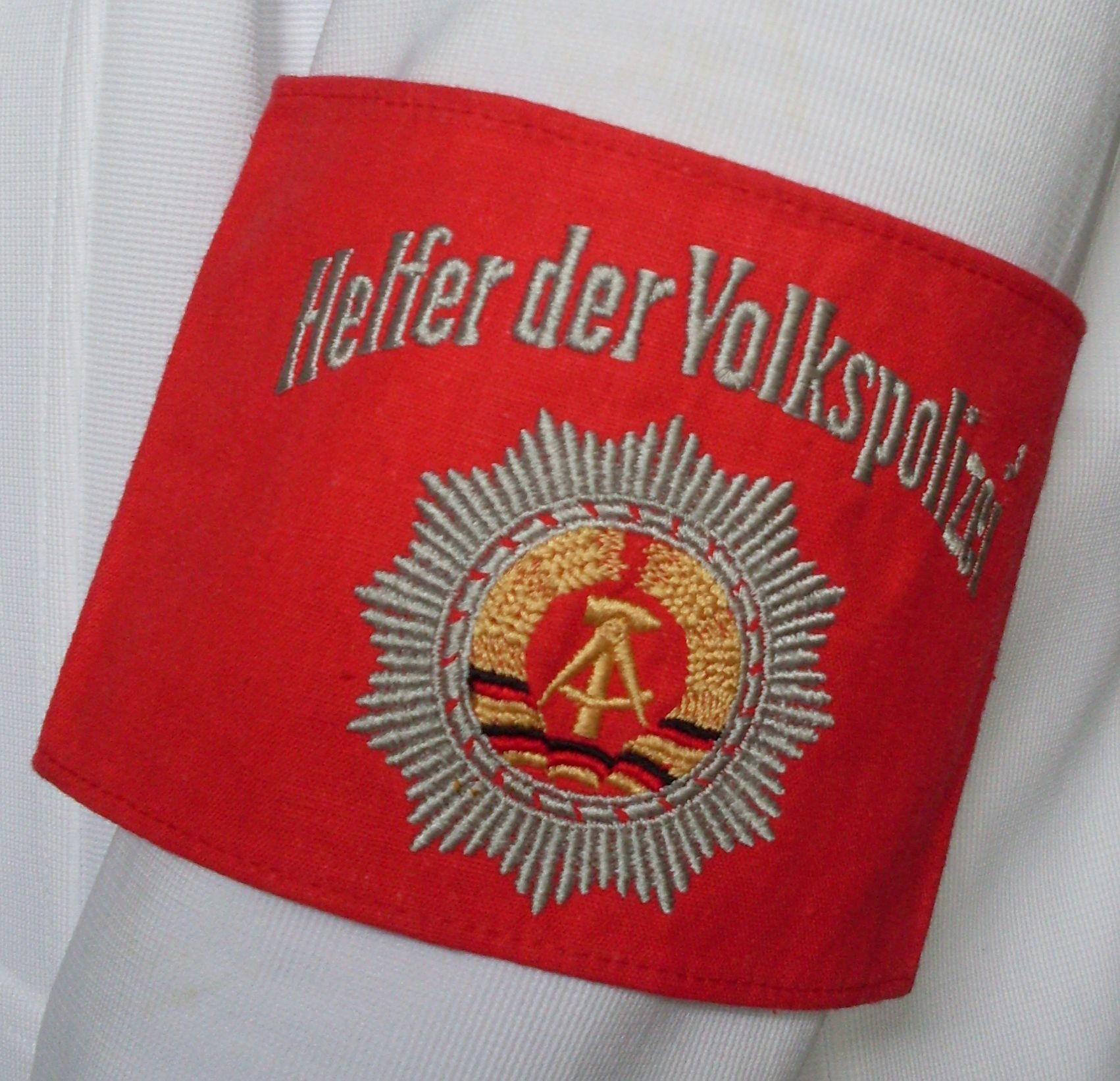 Armbinde freiwiliger Helfer der Volkspolizei